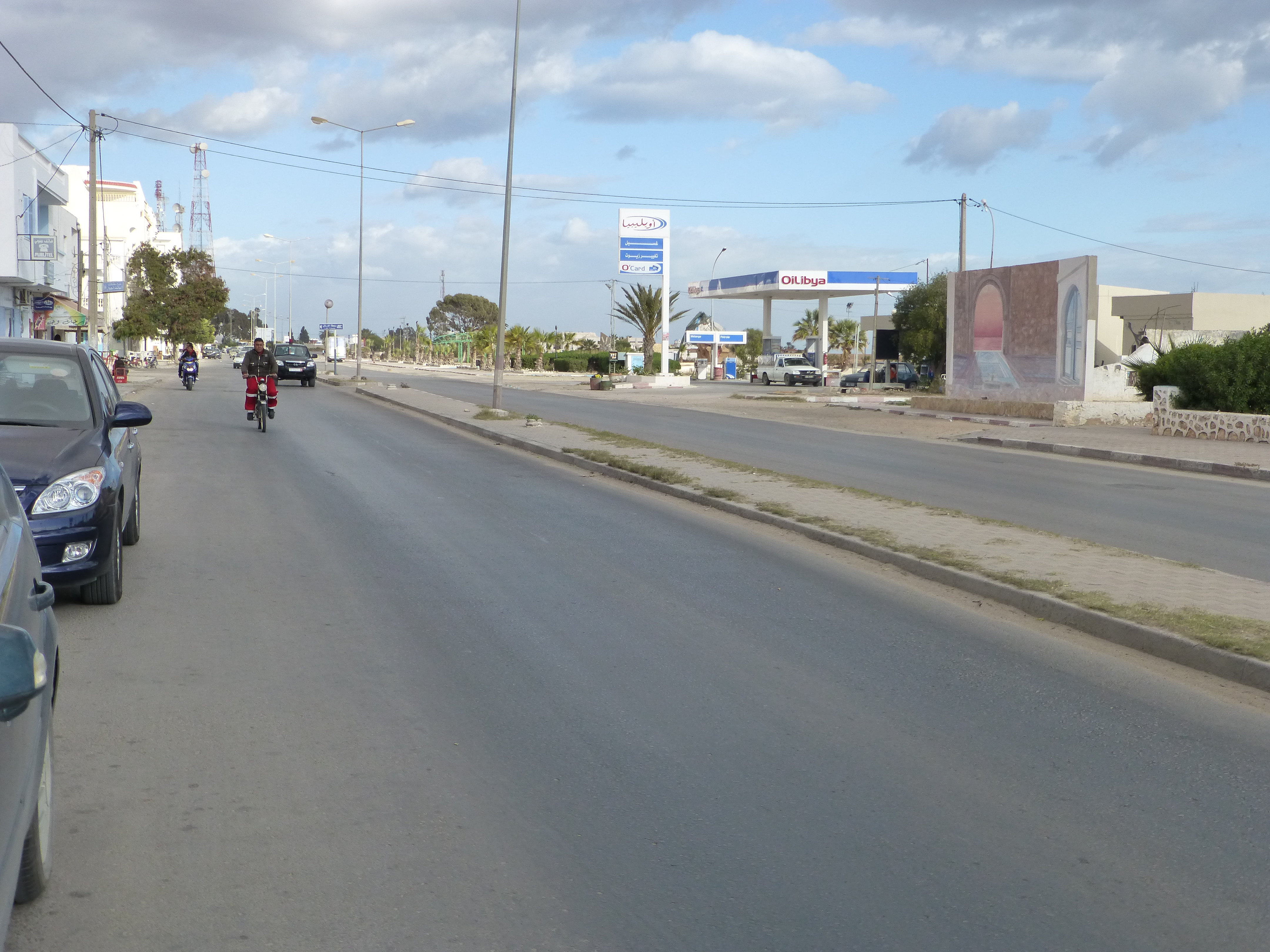 L'avenue principale qui donne sur la corniche à Mahrès.